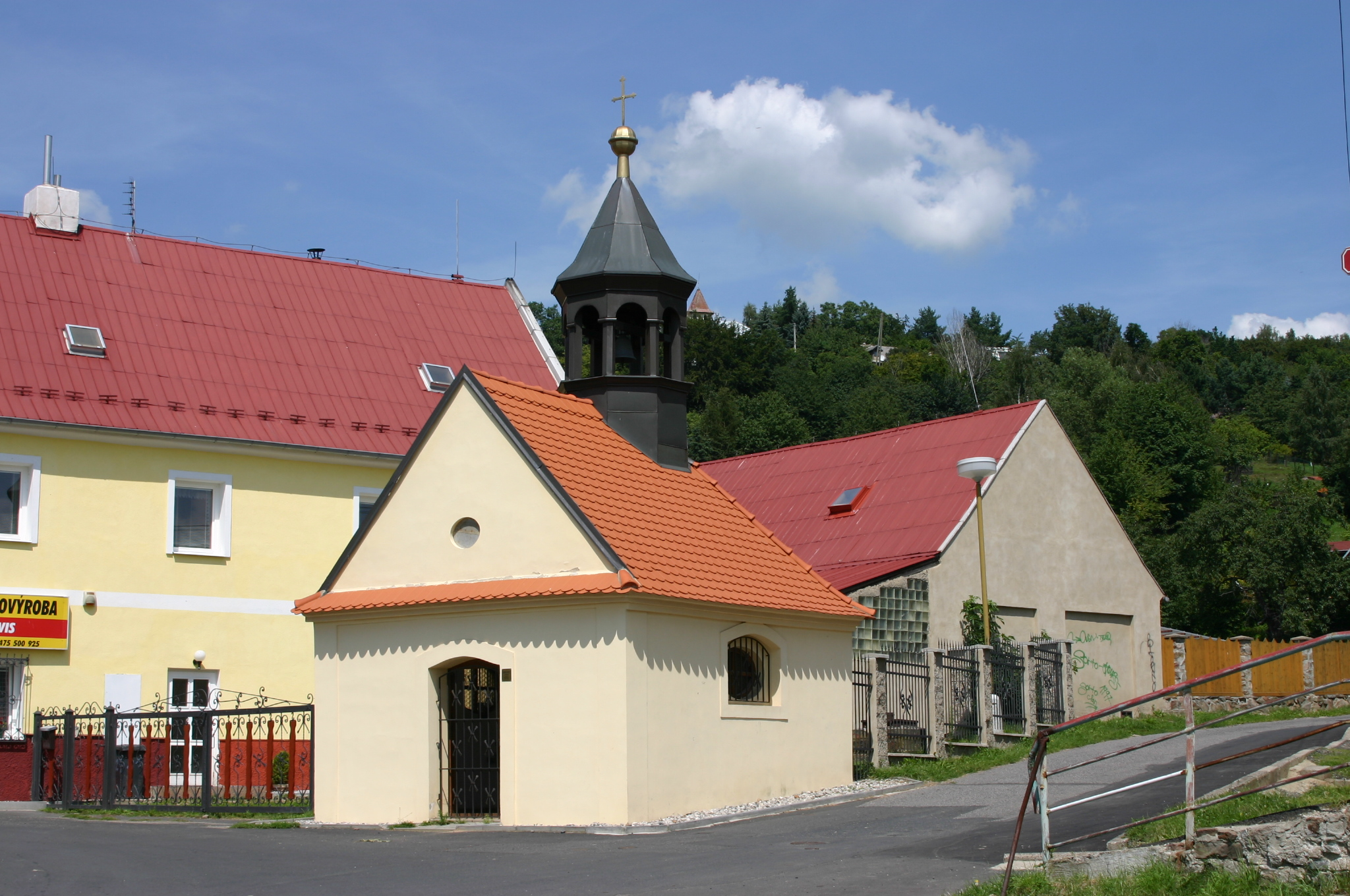 Kaple v osadě Loučná u města Lom v okrese Most.